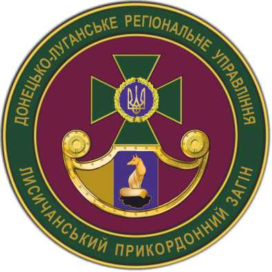 Емблема Лисичанського прикордонного загону ДПСУ